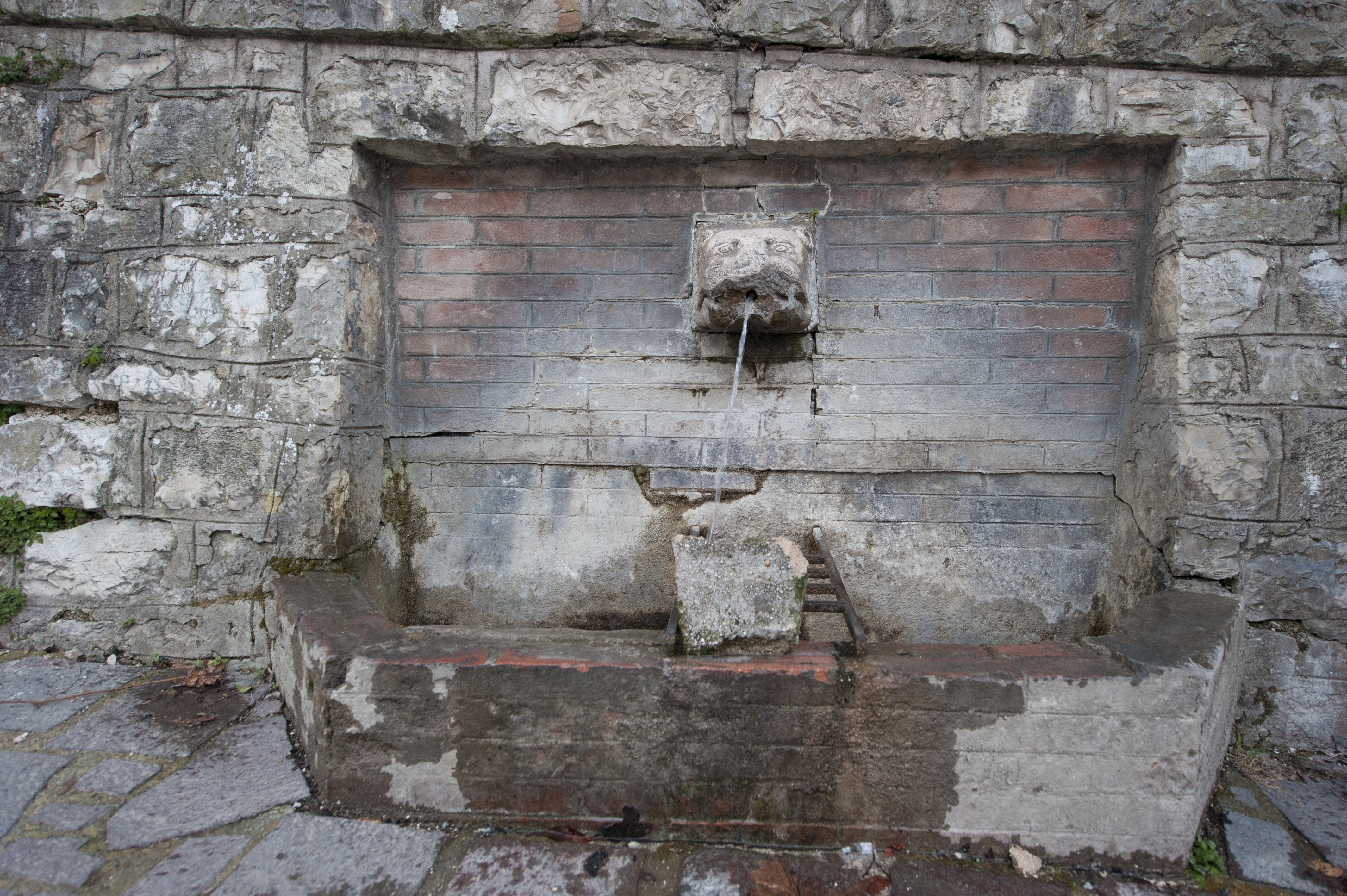 Fontanella di via Madonna di Loreto – Spoleto Destinata a recare sollievo ai pellegrini che affrontavano il lungo rettilineo del portico, questa fontanella eroga acqua da una testa di animale, che forse era di leone, ma ora è consunta. Molto frequentata dagli spoletini che ne apprezzano la qualità dell’acqua.